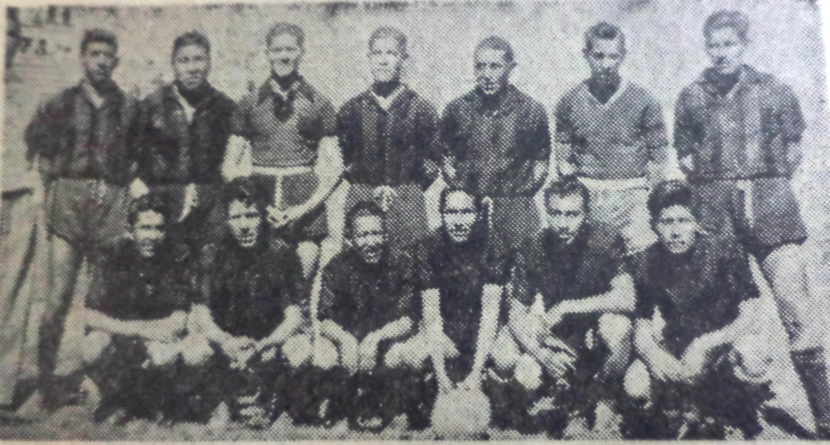 El equipo de Unión Maestranza de Viacha que consigió el tercer lugar y fue gran animador del Primer Campeonato Profesional de la LPFA 1950